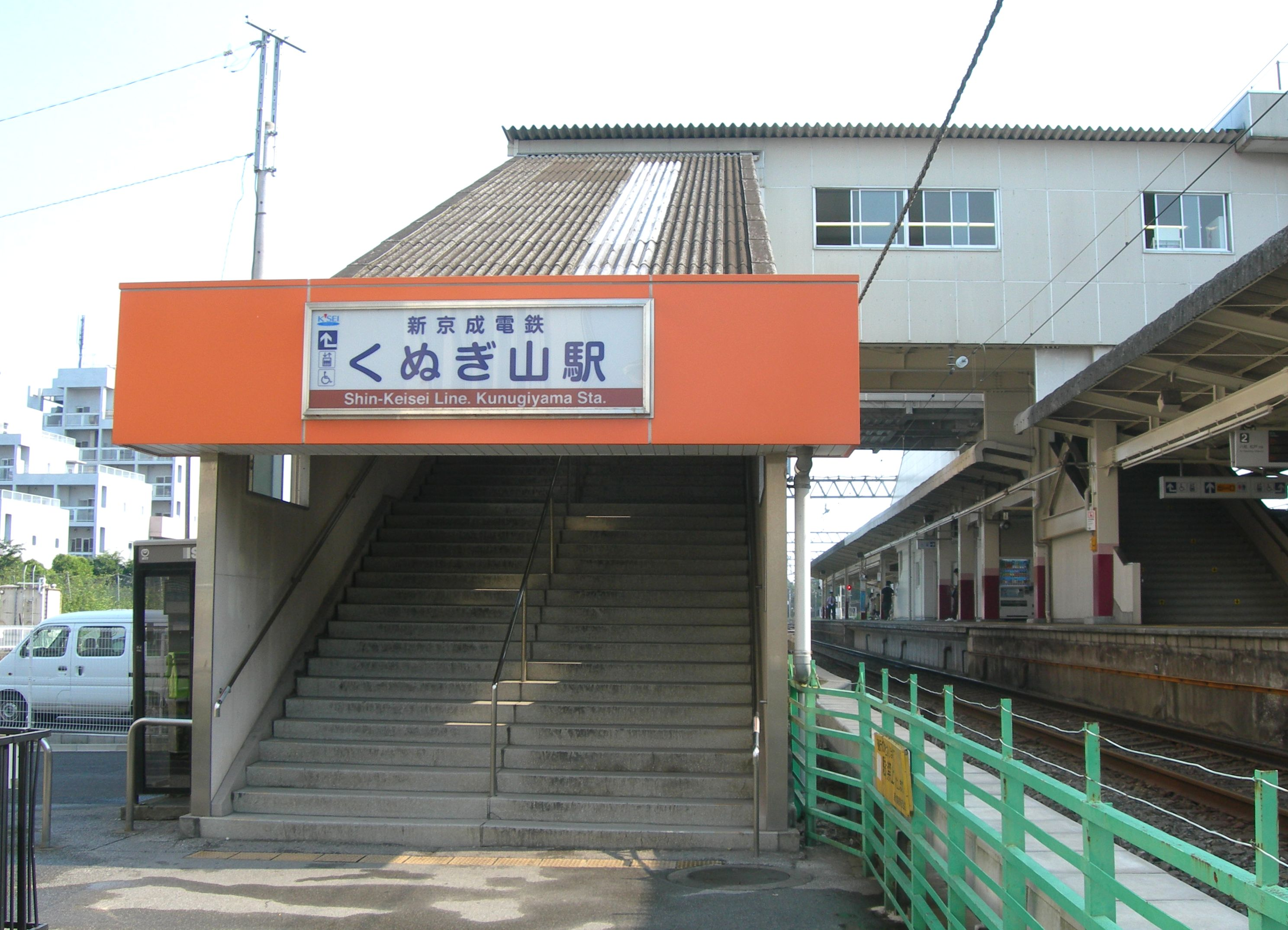 くぬぎ山駅西口